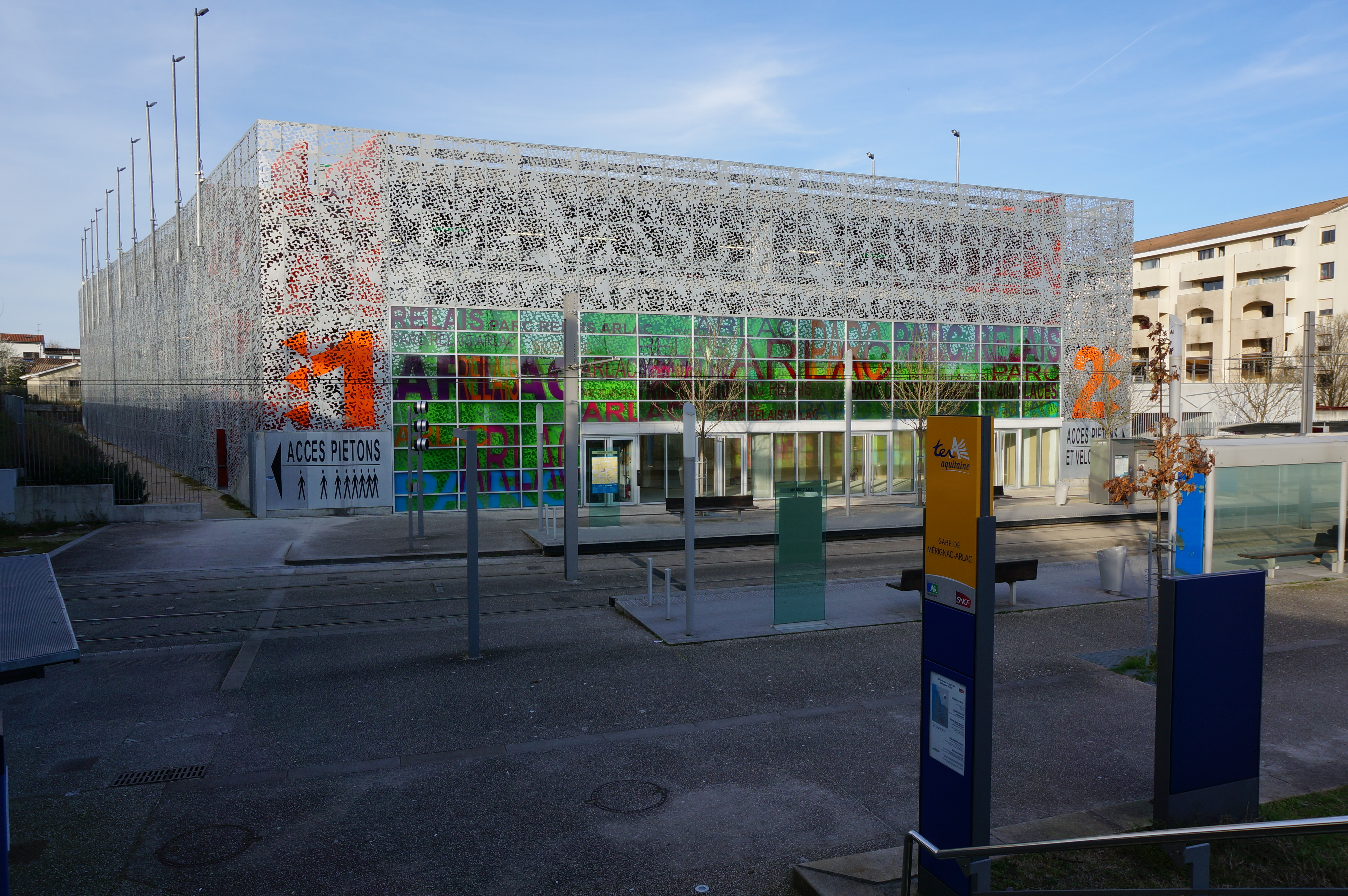 Parking relais à la station de tramway « Fontaines d'Arlac » de Mérignac en Gironde. Il donne accès au tramway (ligne A), au train (gare de Mérignac-Arlac), au vélo Cub, et à l'autopartage BlueCub.